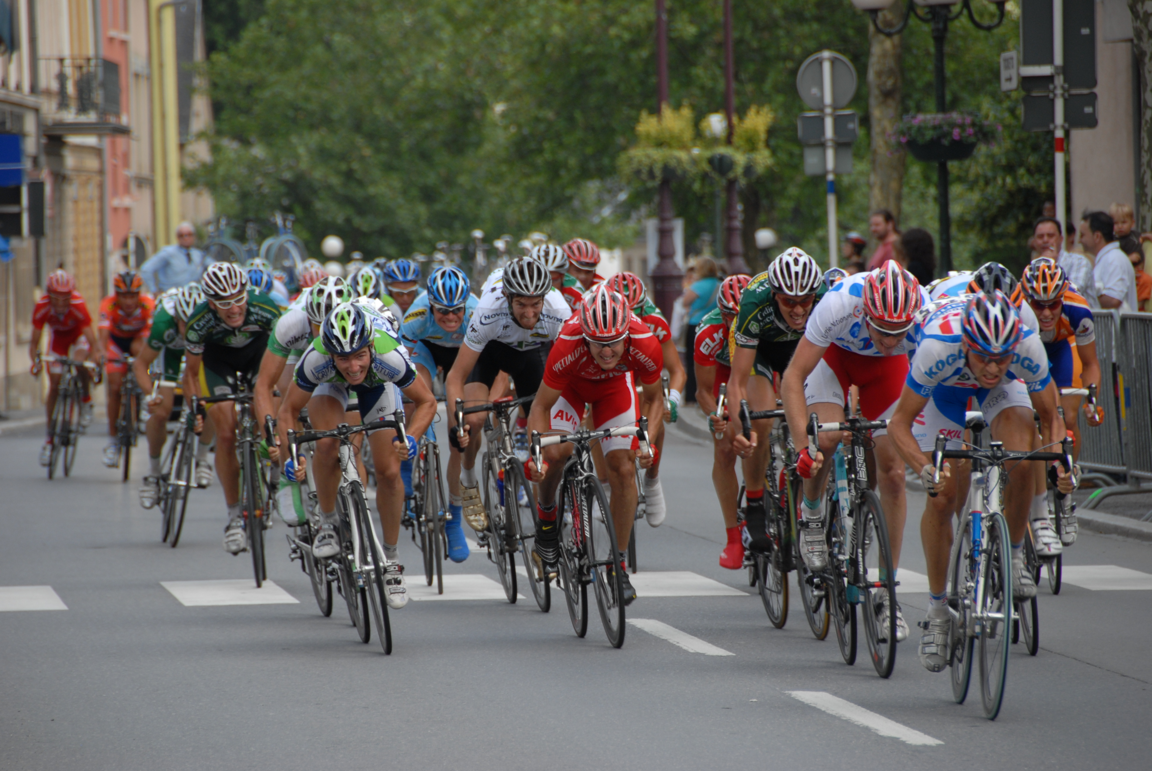 Skoda Tour de Luxembourg 2007, de Sprint vun der 3. Etapp